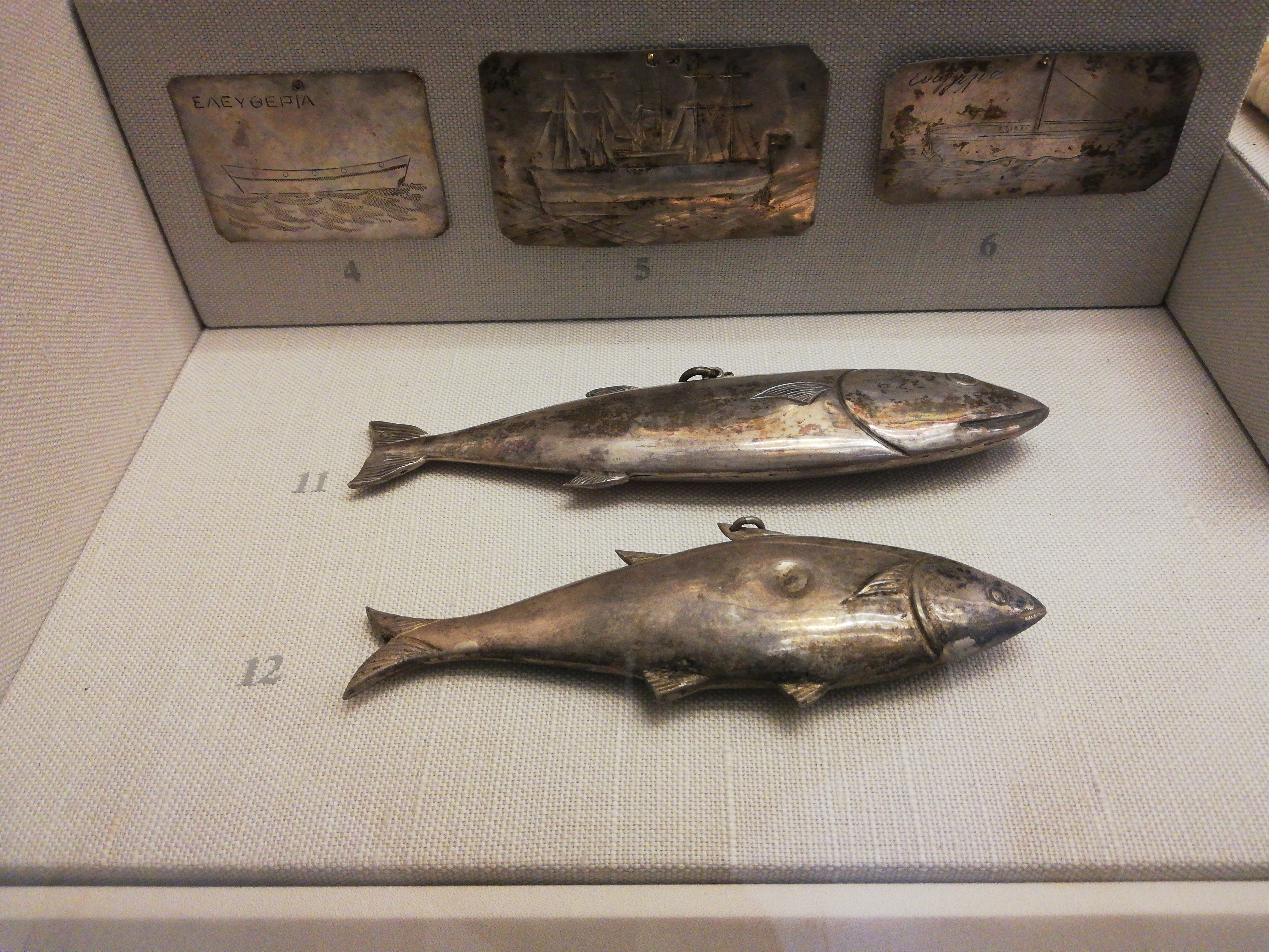 Ex-voto en forme de poisson. Constantonople, XIXe siècle.